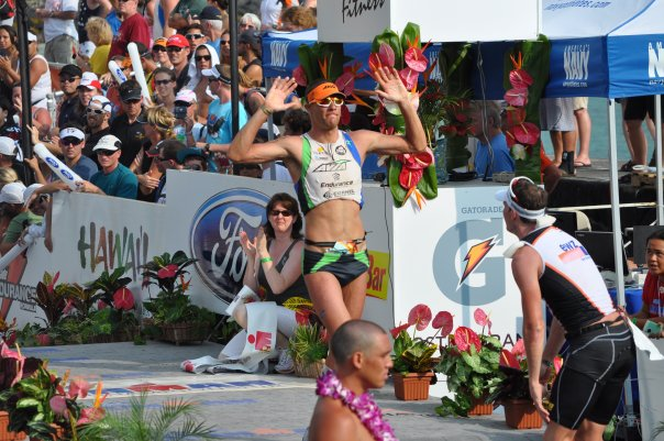 finish ironman hawai